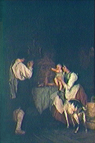 Driendl präsentierte das bereits 1878 in Deutschland geschaffene Bild mit großem Erfolg in Brasilien auf der Kunstausstellung exposição da Sociedade Propagadora das Belas Artes des Imperial Liceu de Artes e Ofícios (der Akademie für Kunst und Handwerk) sowie 1884 auf der Exposição Geral der Kaiserlichen Akademie der Schönen Künste (Academia Imperial das Belas Artes AIBA) in Rio de Janeiro. Das dunkle Bild zeigt in der Mitte einen schwach beleuchteten Tisch, über dem ein Kruzifix hängt, und um den Tisch eine Familie im Gebet.